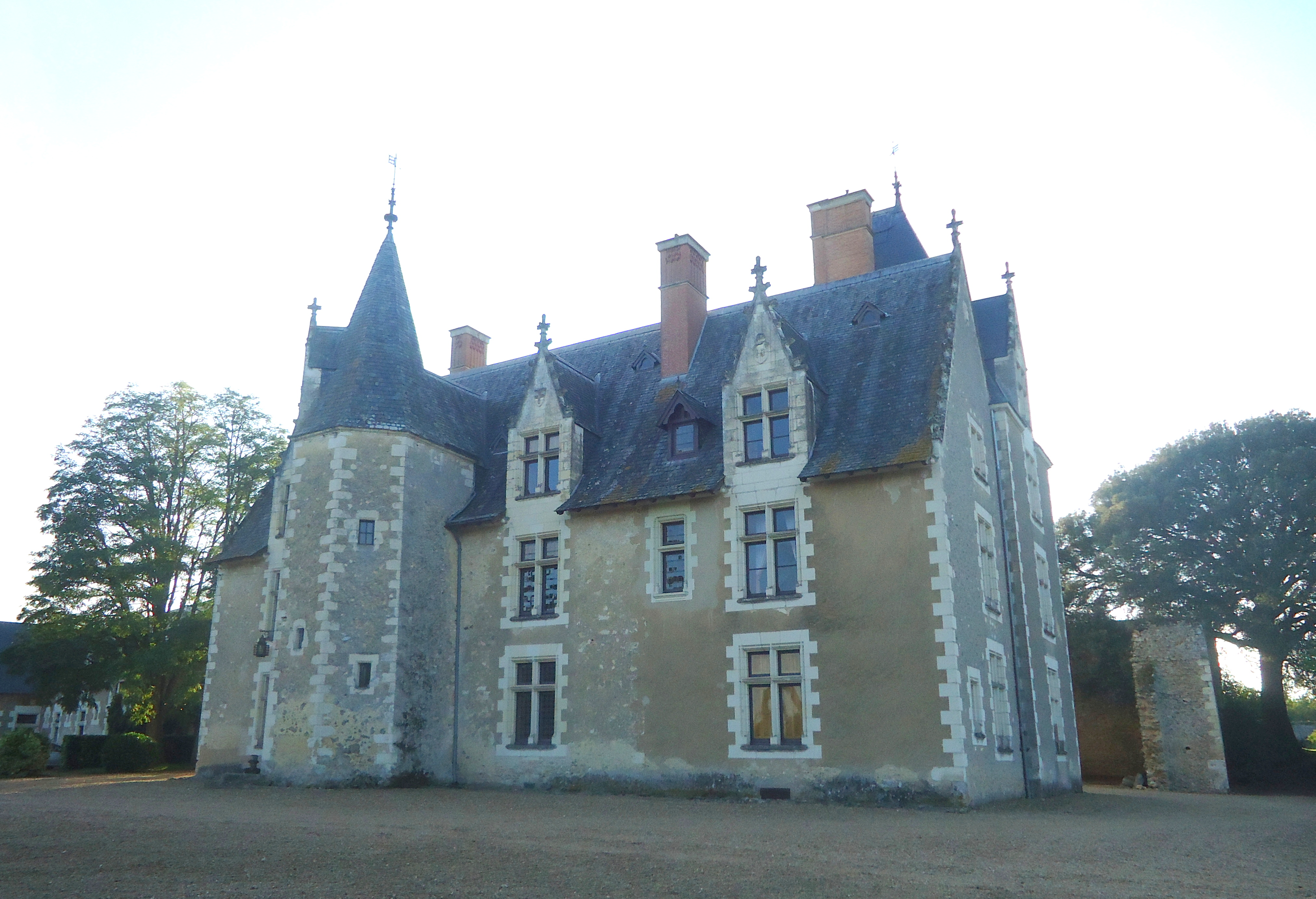 Façade est du Manoir dit château de Lorrière. .